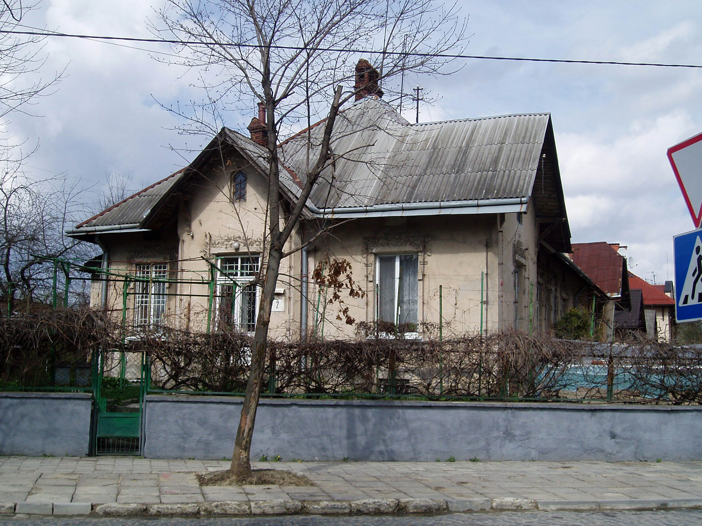 Будинок № 2 на вулиці Залізняка у Львові. Збудований 1902 року за проектом Емануеля Яримовича.